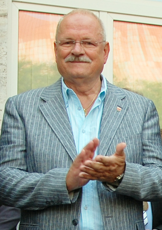 Ivan Gašparovič